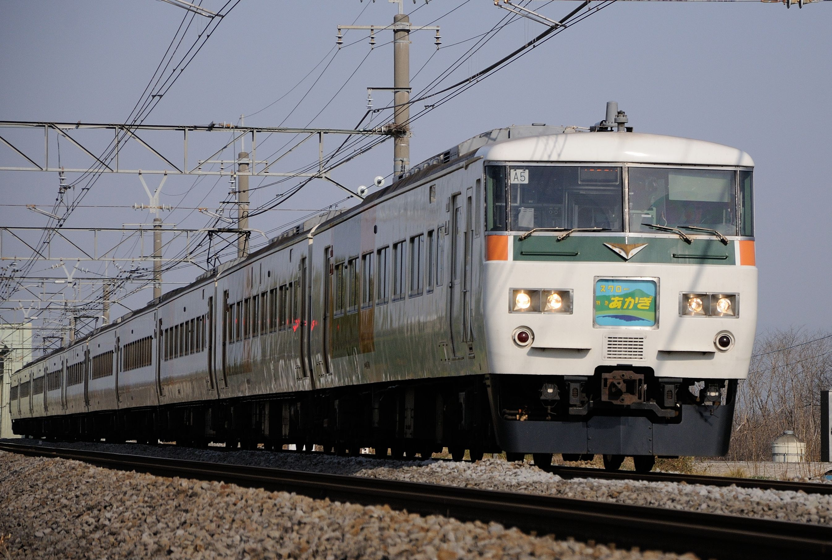 185系による特急スワローあかぎ新宿行10両編成。新町-神保原間にて撮影。